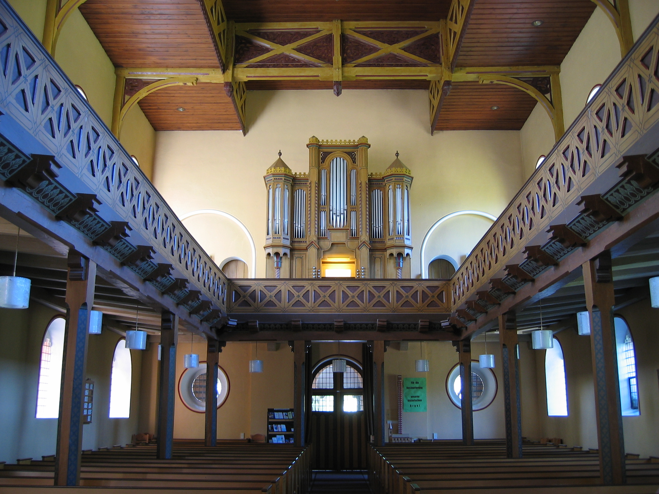 Orgel der ev.-luth. Marcuskirche in Wettmar, erbaut von Andreas Engelhardt